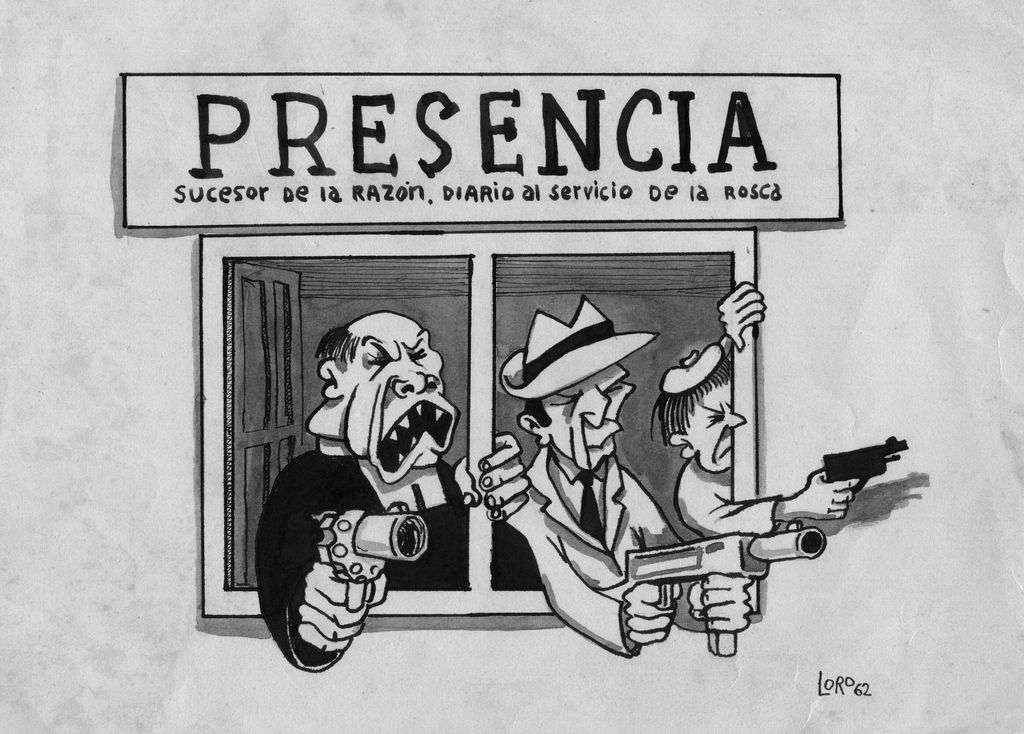 Karikatur von Jorge Vazquez Viana